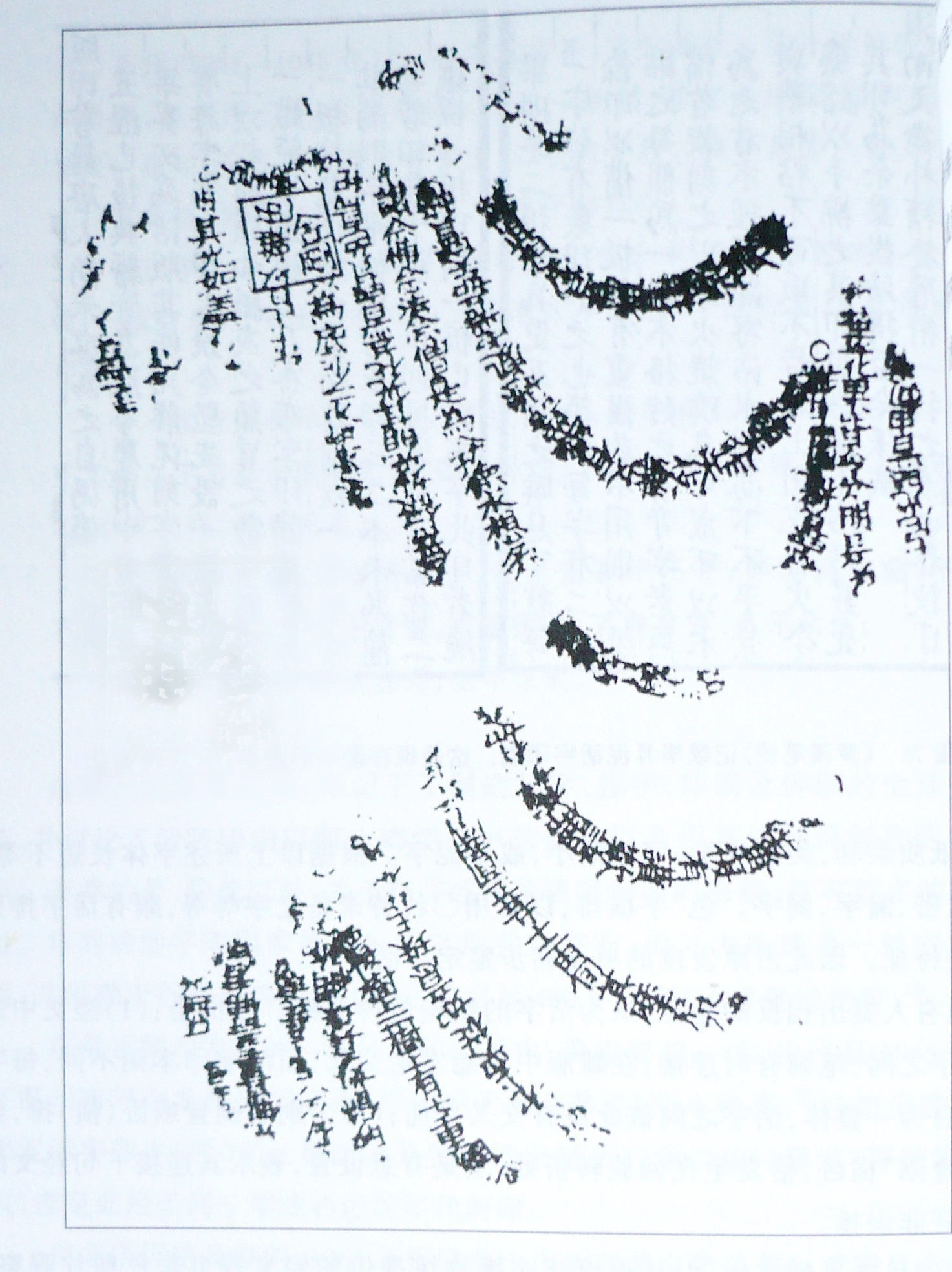 《佛说观无量寿佛经》残页